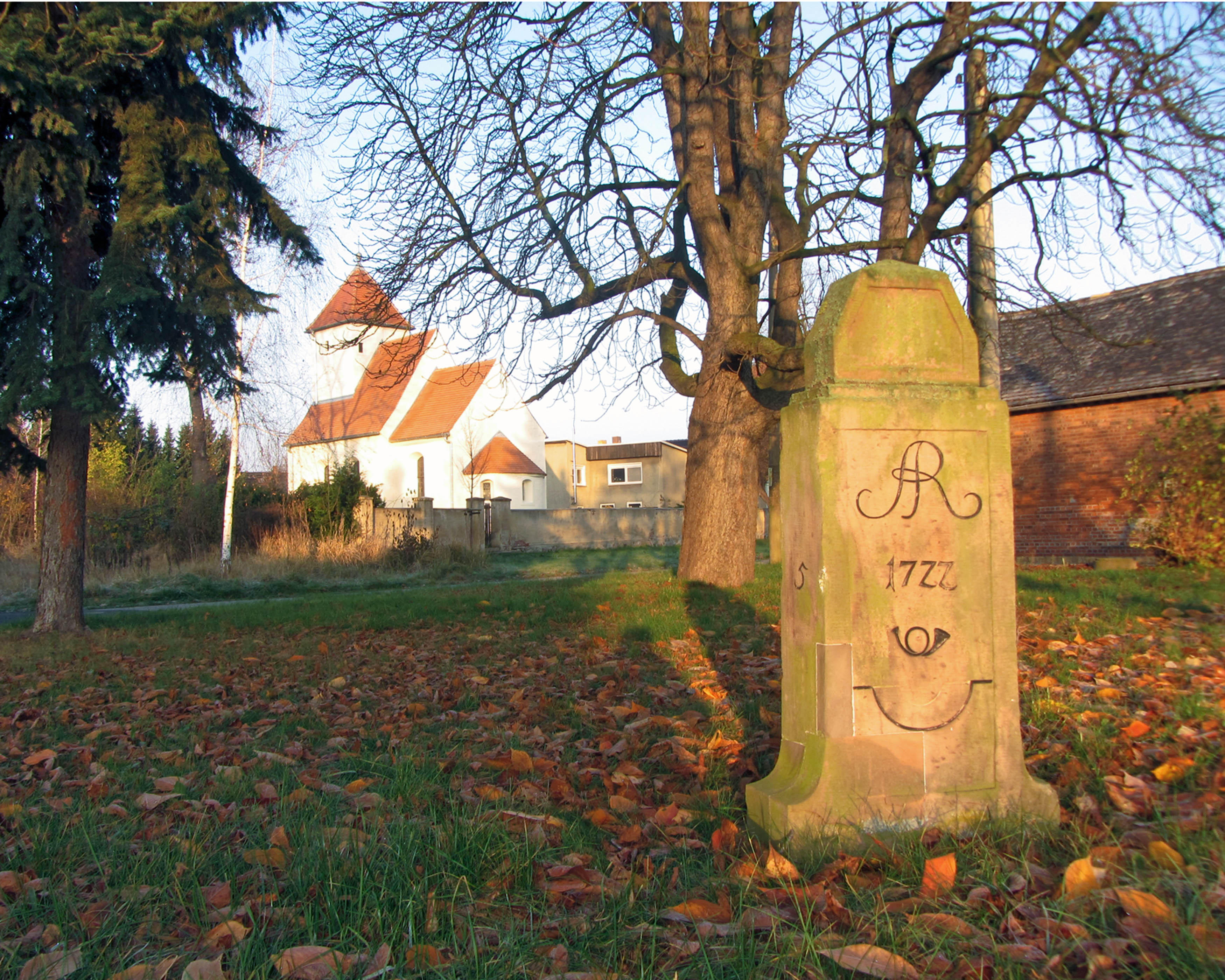 Kursächsischer Viertelmeilenstein Nr. 5 in Grehbehna. Inschrift: AR ; 1722 ; Posthorn